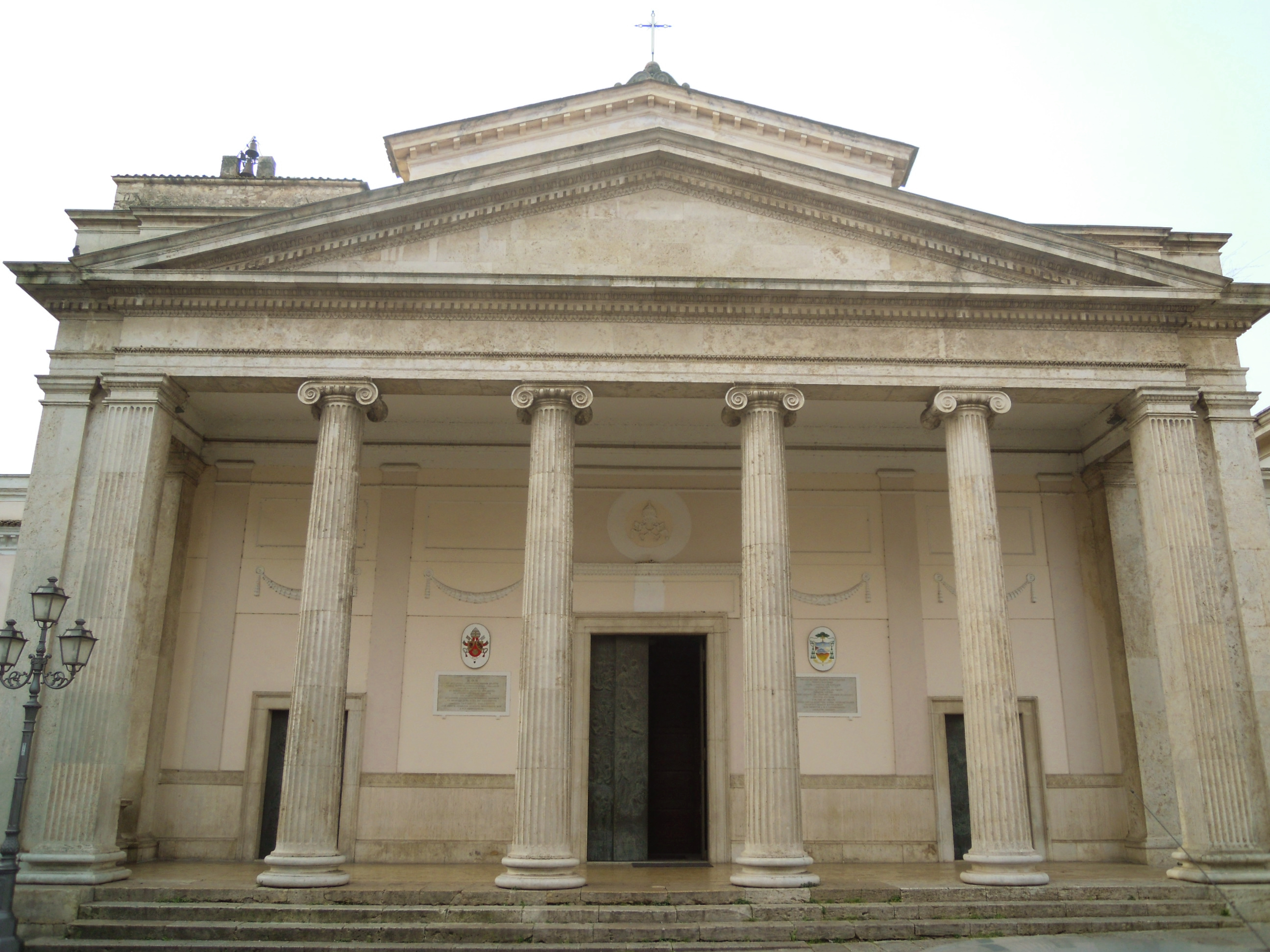 La facciata col pronao ottocentesco della cattedrale di Isernia.